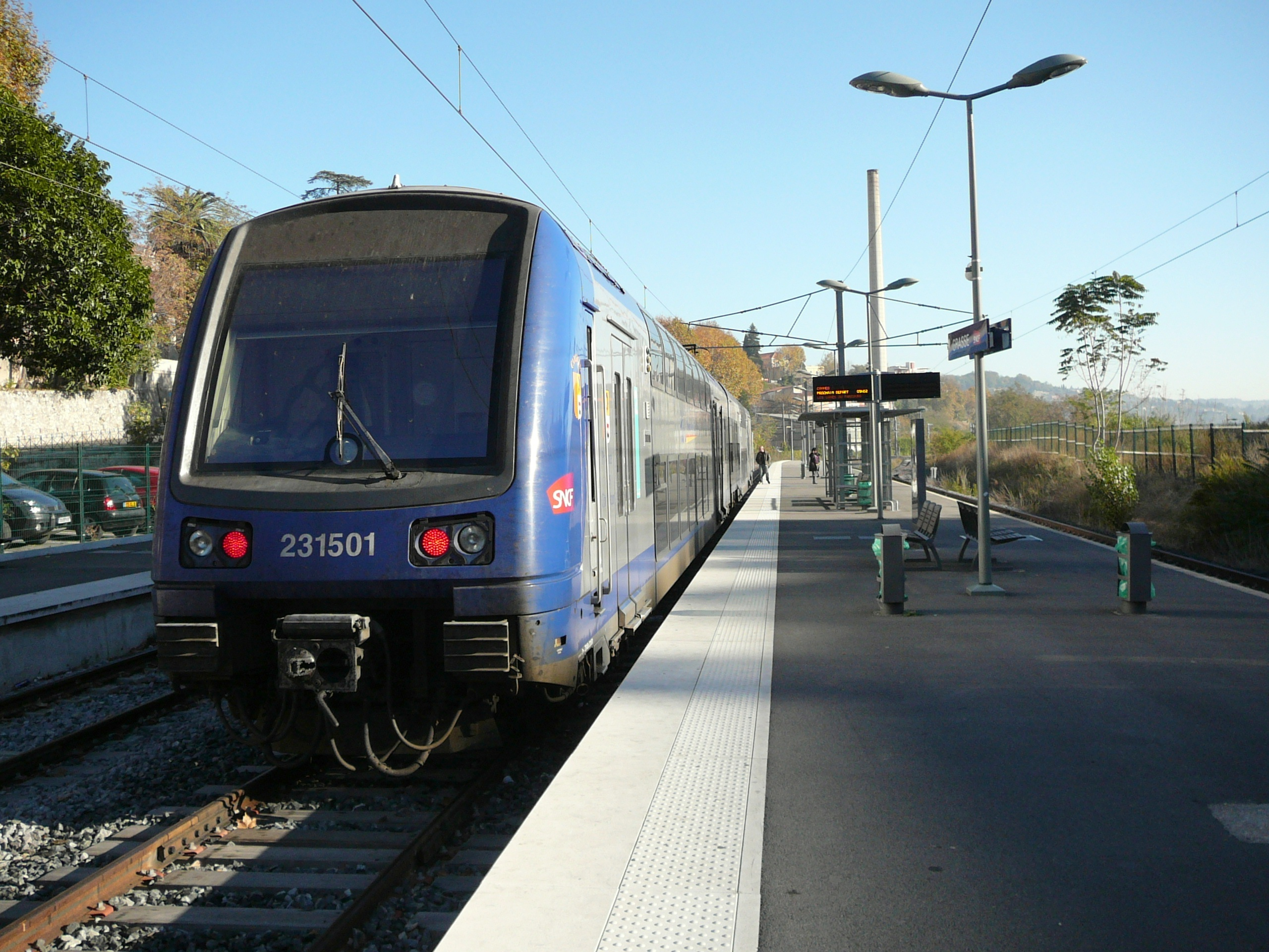 Z23500 en gare de Grasse